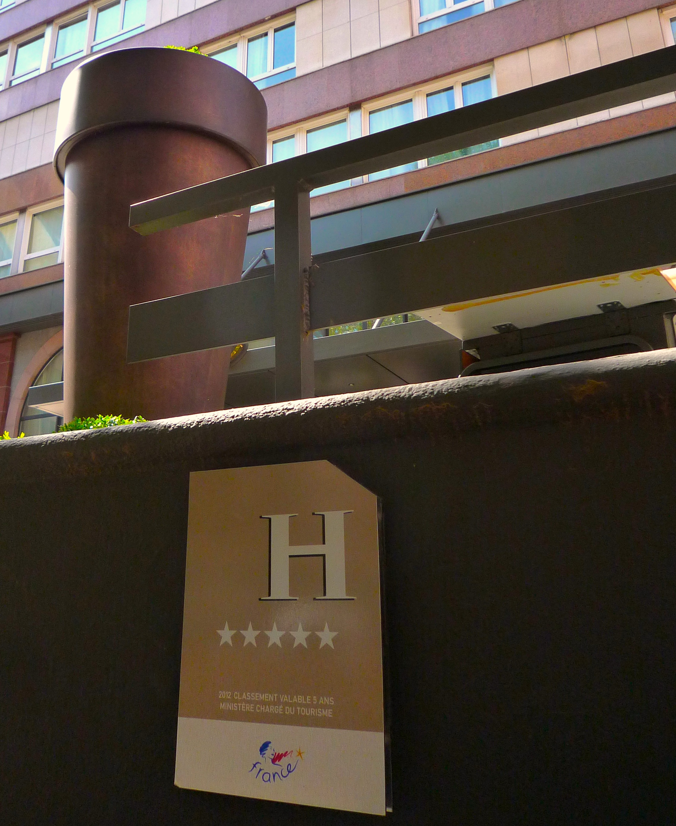 Strasbourg, 4 Place Saint-Pierre le Jeune, plaque de classification cinq étoiles de l’hôtel Sofitel